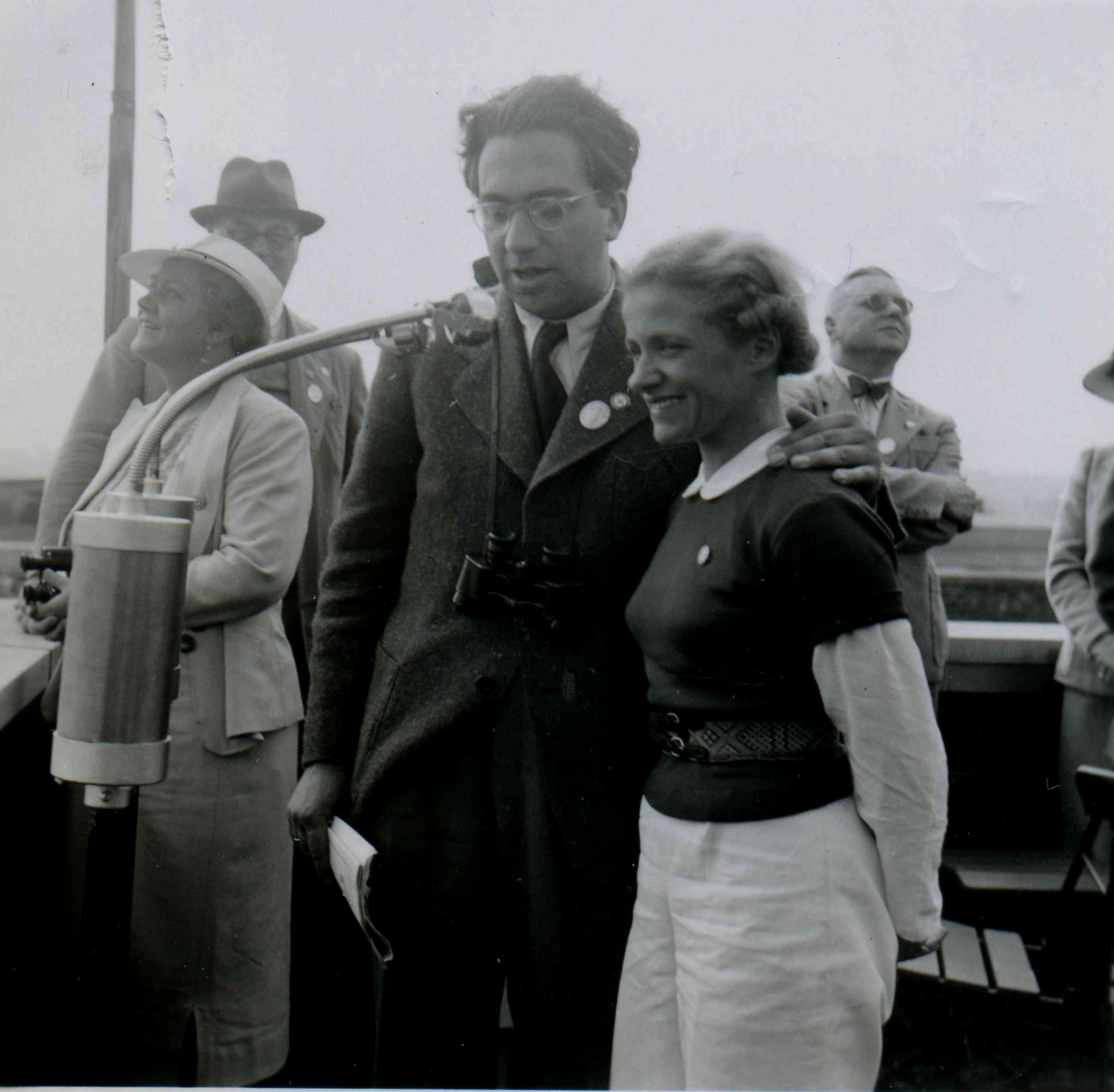 Foto anlässlich eines Großflugtages in Kassel-Waldau am 17. Juli 1938, der vom Fieseler Flugzeugbau Kassel maßgebend gestaltet wurde. Teilnehmer: Dipl.-Ing. Erich Bachem und Hanna Reitsch. Bachem war zu der Zeit der Techn. Direktor des Fieseler Flugzeugbau und moderierte diesen Flugtag.